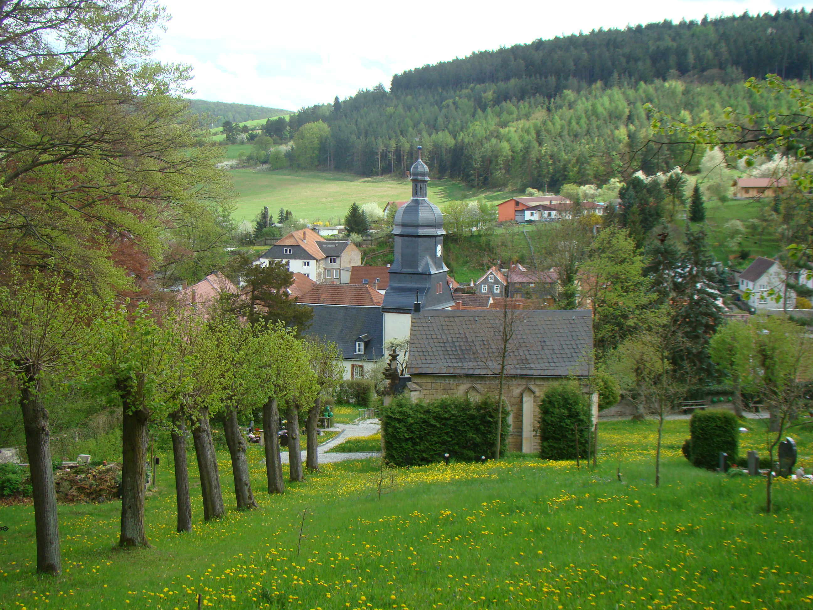 Friedhof in Angelroda